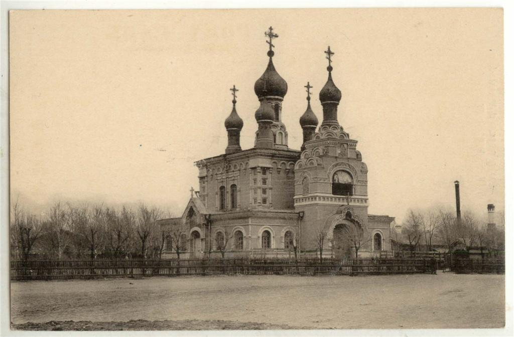 Иверская церковь в Харбине